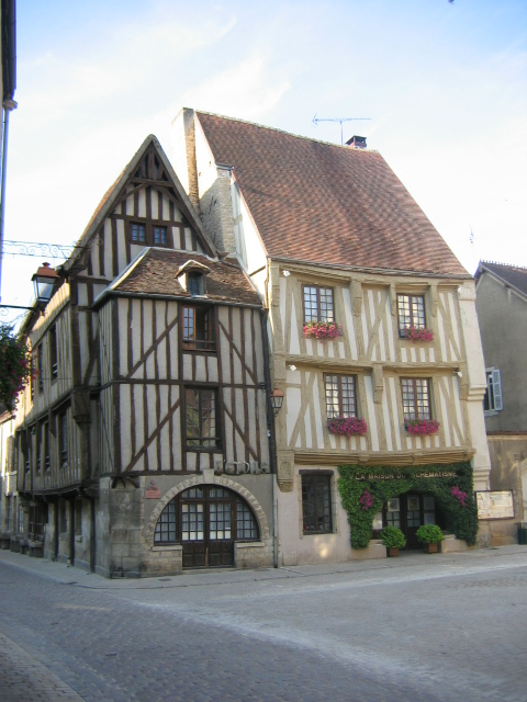 Place de l'hôtel de ville, Noyers-sur-Serein, Yonne, Bourgogne, France.